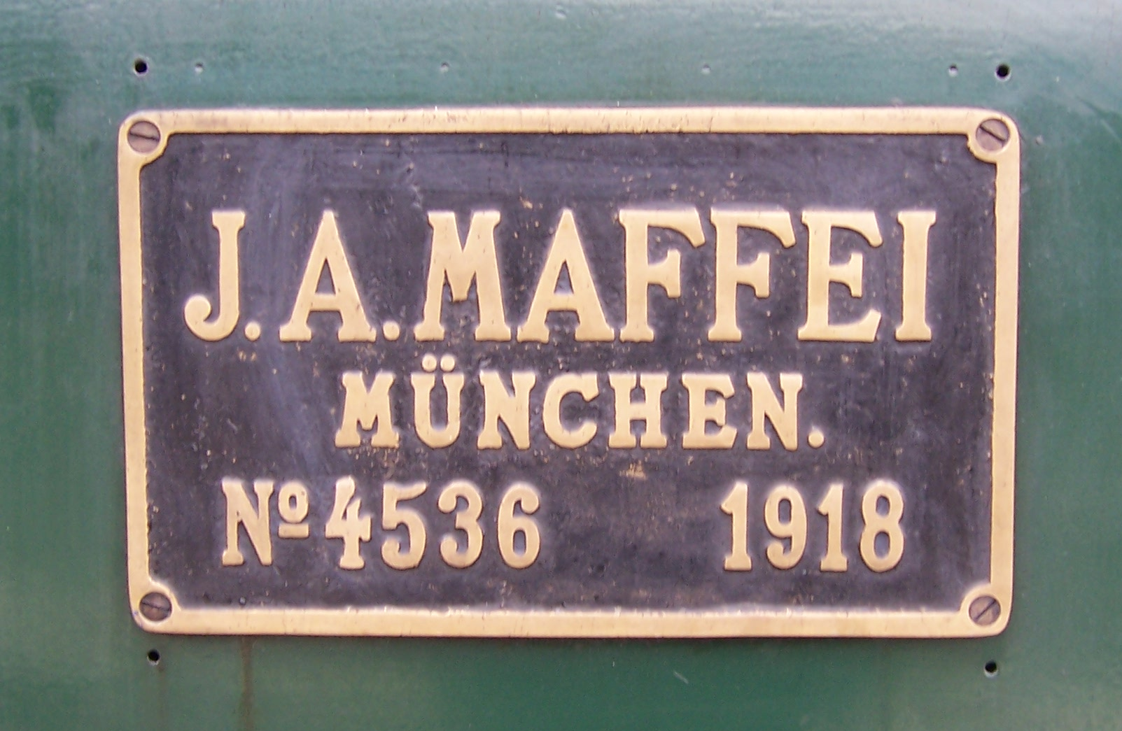 S 3/6 im Bayerischen Eisenbahnmuseum